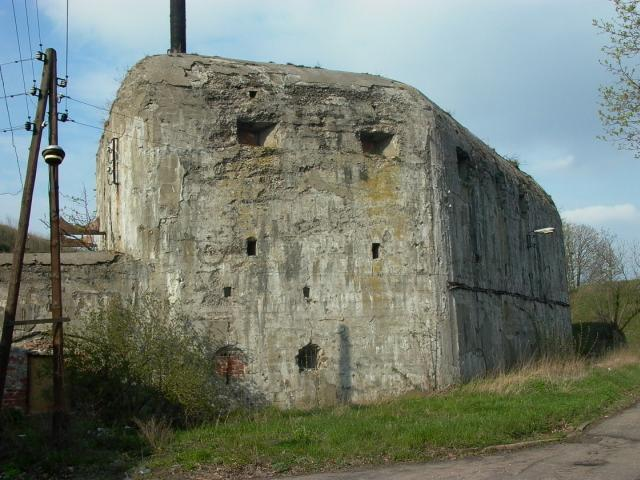 Zakroczym, ul. Byłych Więźniów Twierdzy Zakroczymskiej - kaponiera szyjowa Fortu I Twierdzy Modlin.